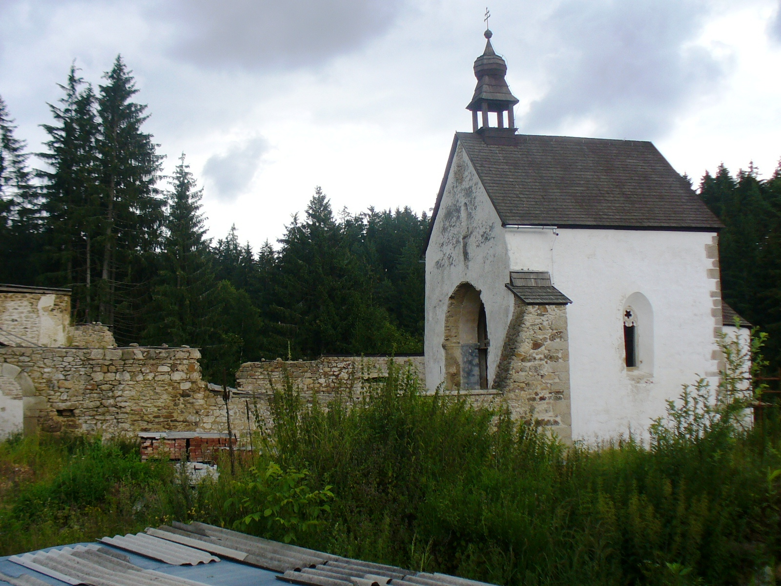 Kostel sv. Jana Křtitele, zřícenina, v zahradě čp. 19, Pomezí (Staré Město pod Landštejnem).